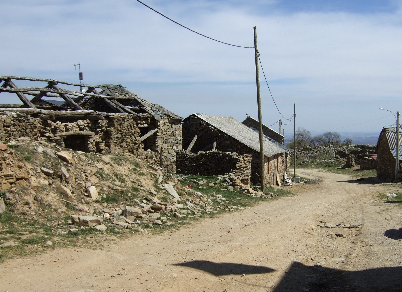 Foncebadon im April 2009